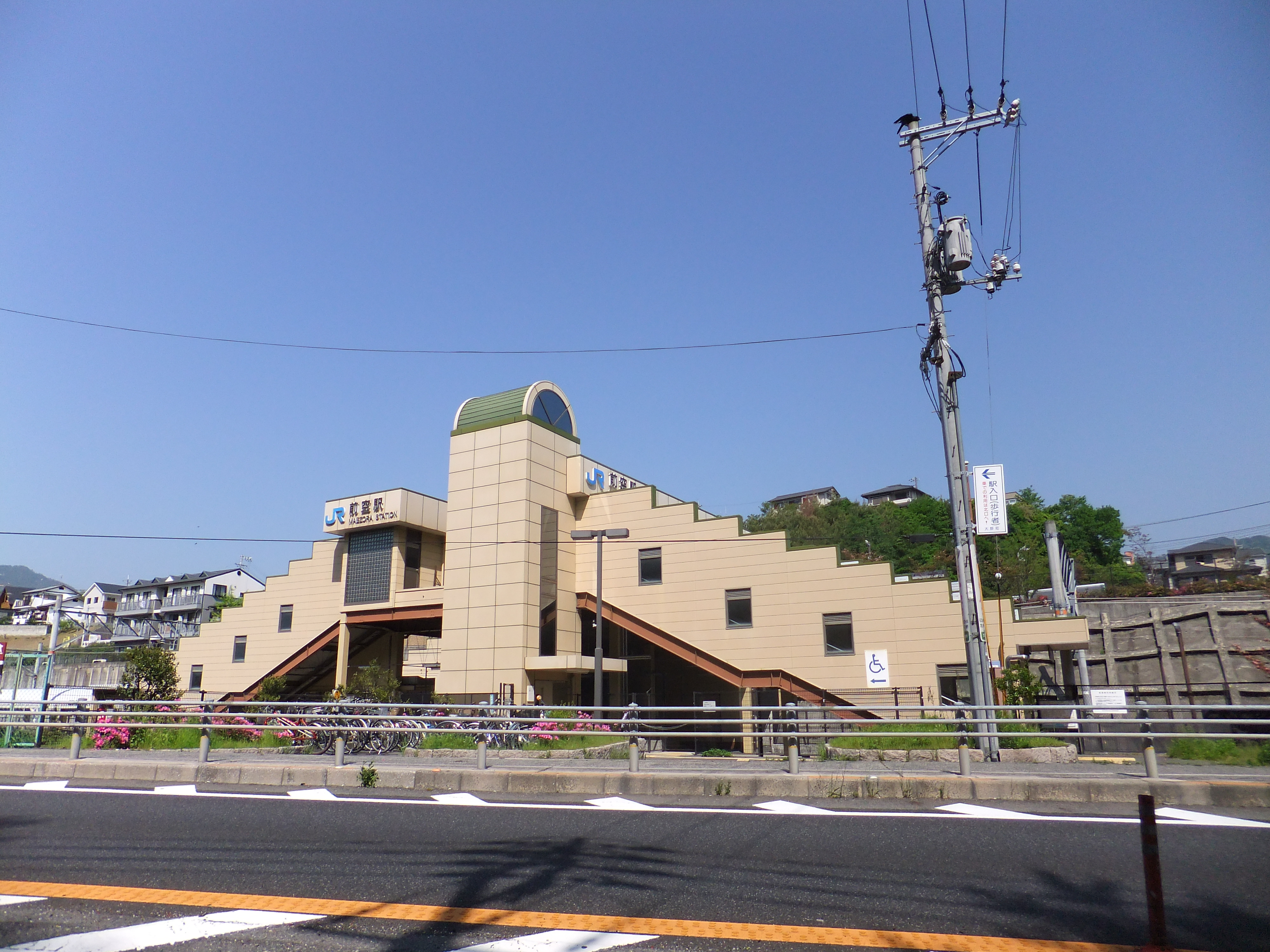 前空駅